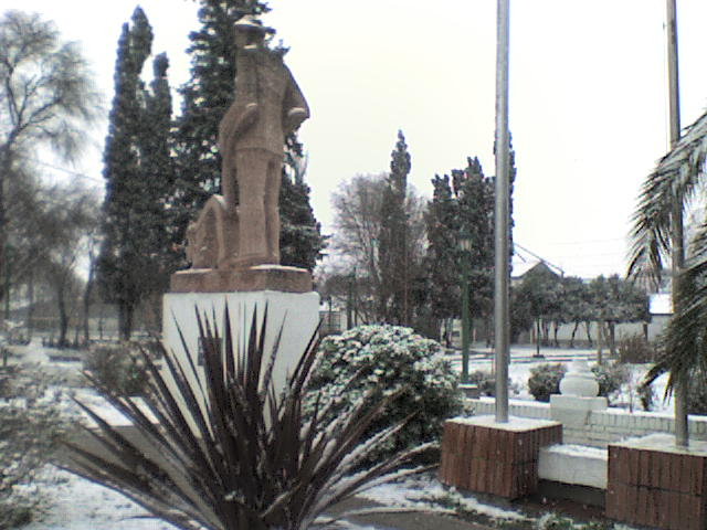 El Gringo